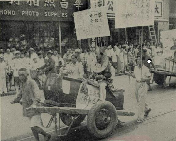 9月9日，蒋经国策动上海市民举行肃清奸商大游行 题名： 蒋经国打虎:国府实施币制改革后,最重要的一种措施,就是竭力管制物价,严禁囤积居寄.尤以上海区经济管制督导蒋经国大刀阔斧拘捕投机奸商(人们称之曰打虎),更引人注意: 文献来源： 《中美周报》 出版时间： 1948 年 卷期(页)： [ 第304期 ，1页 ] 中图分类号： D829.712